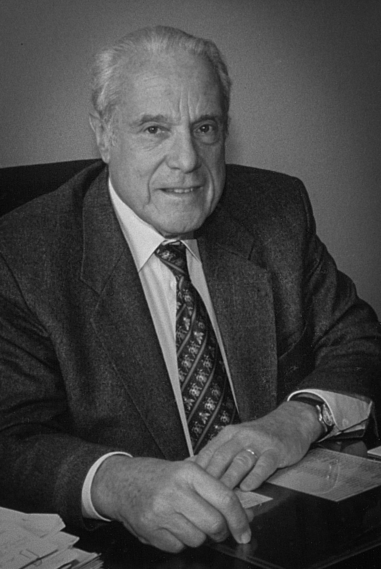 Paris - Domicile personnel - 1995